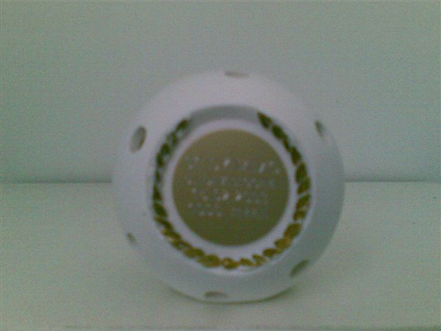 Seuran 1000. maali SSBL:n sarjoissa